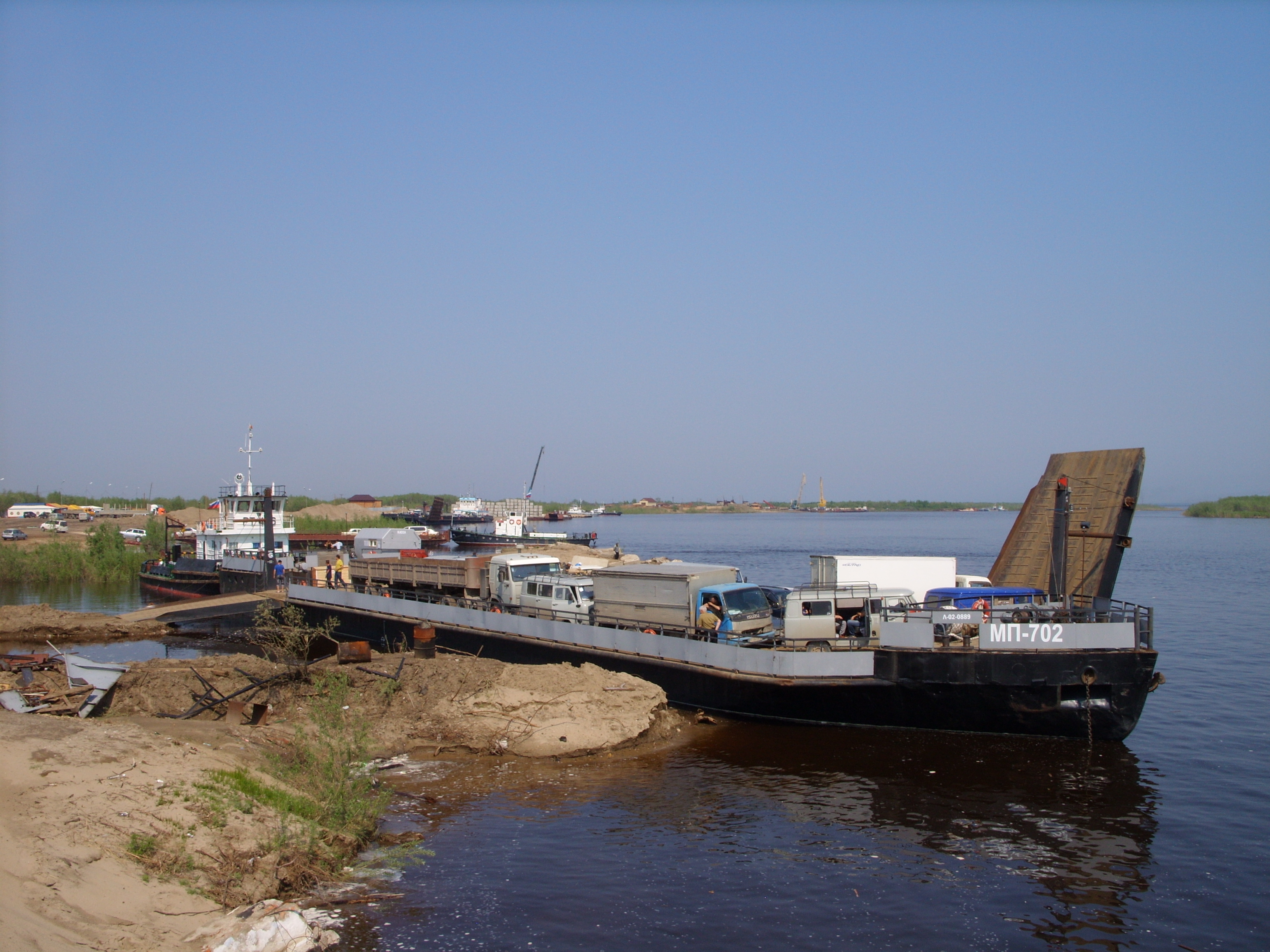 Паромная переправа Якутск (Даркылах) - Нижний Бестях